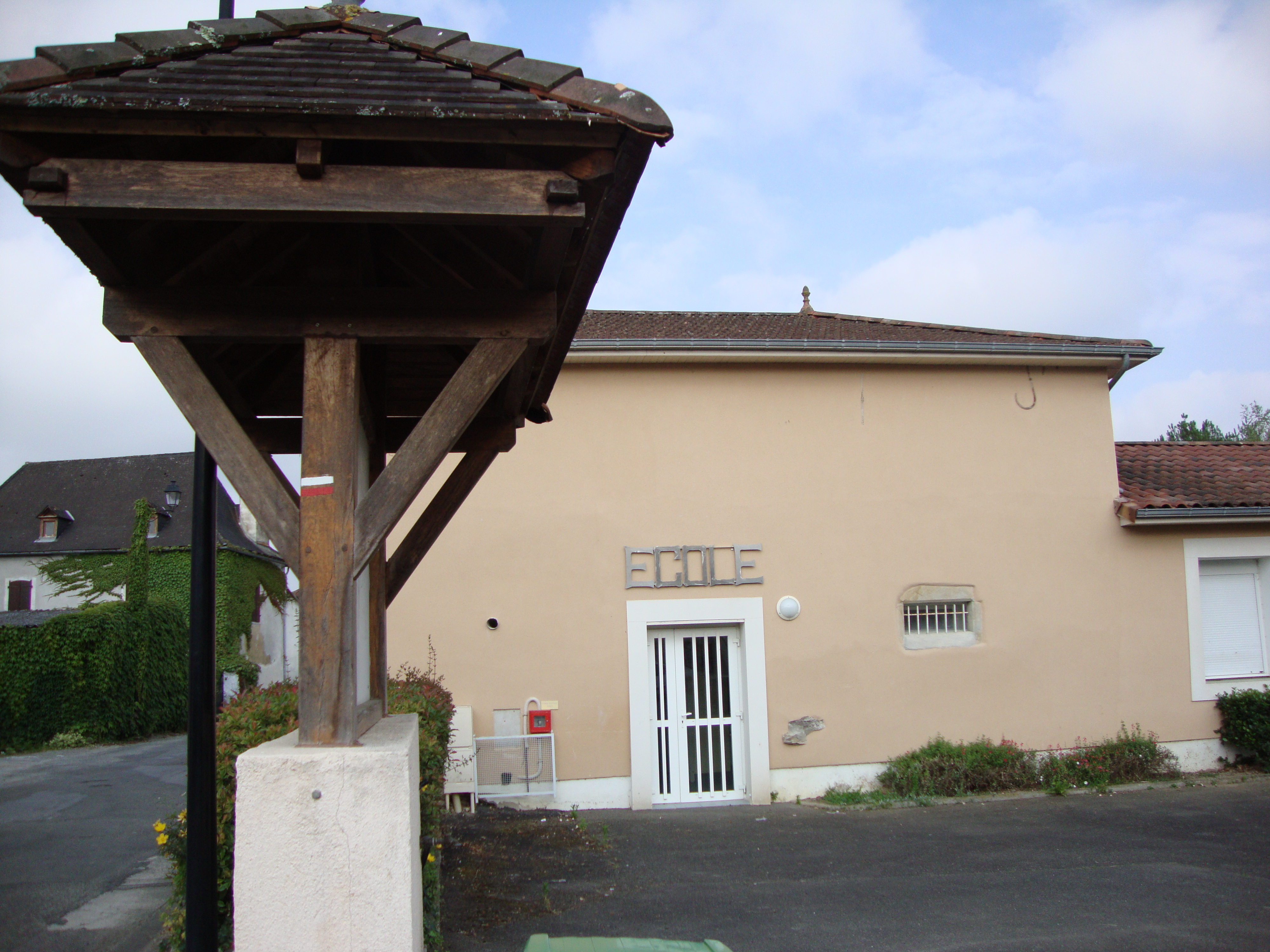 Préchacq-Josbaig (Pyr-Atl, Fr) school